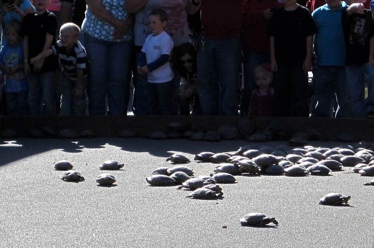 81st Terrapin Derby 2011 in Lepanto, Arkansas